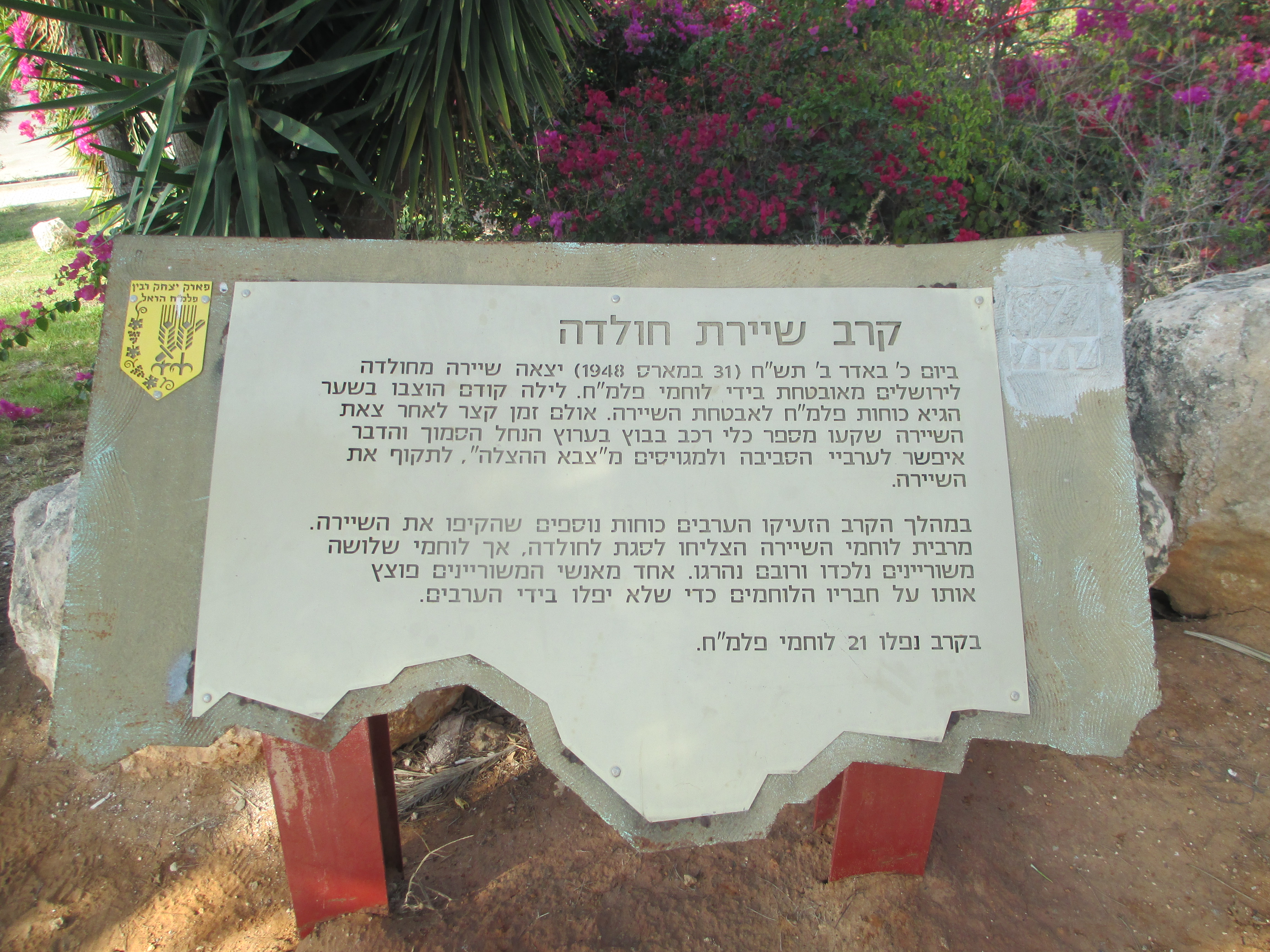 סיפור שיירת חולדה באנדרטת חיל ההנסה ליד צומת חולדה